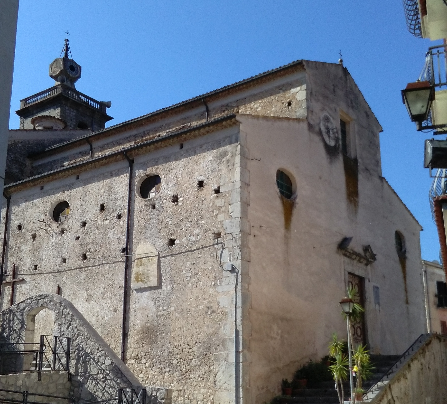 Chiesa di Santa Maria la Nova a Sant'Elia Fiumerapido